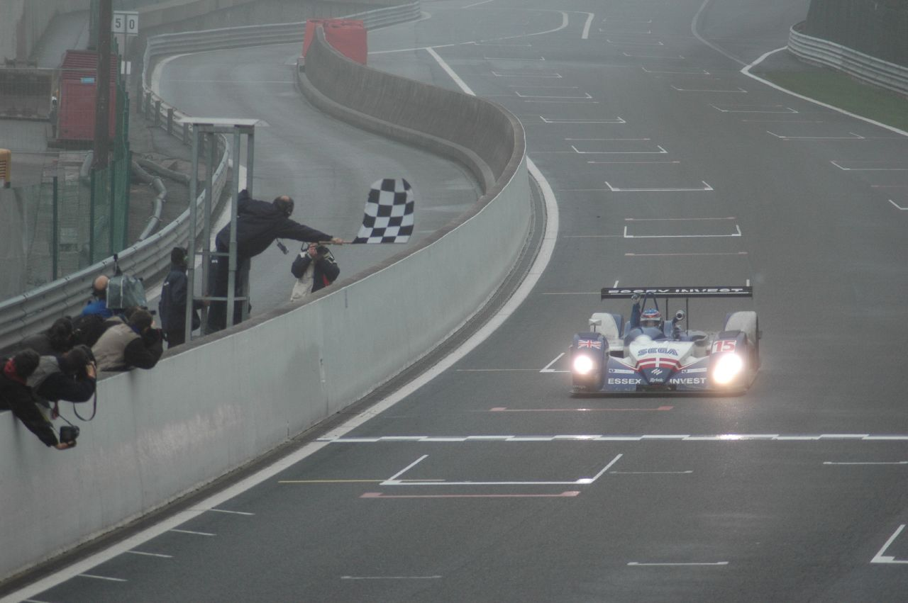 15 Zytek 04S, winner of the 2005 1000km of Spa (Nielsen/Elgaard/Shimoda)